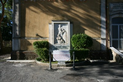 Questo file è licenziato in base ai termini della licenza Creative Commons Attribution ShareAlike 3.0 Unpor